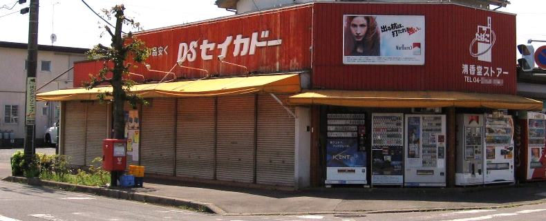 清香堂ストアー